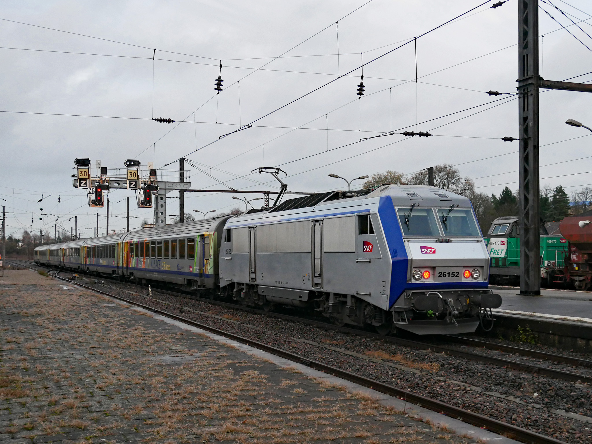 BB 26152 rénovée "TER Grand Est" en pousse d'une rame Corail réversible.